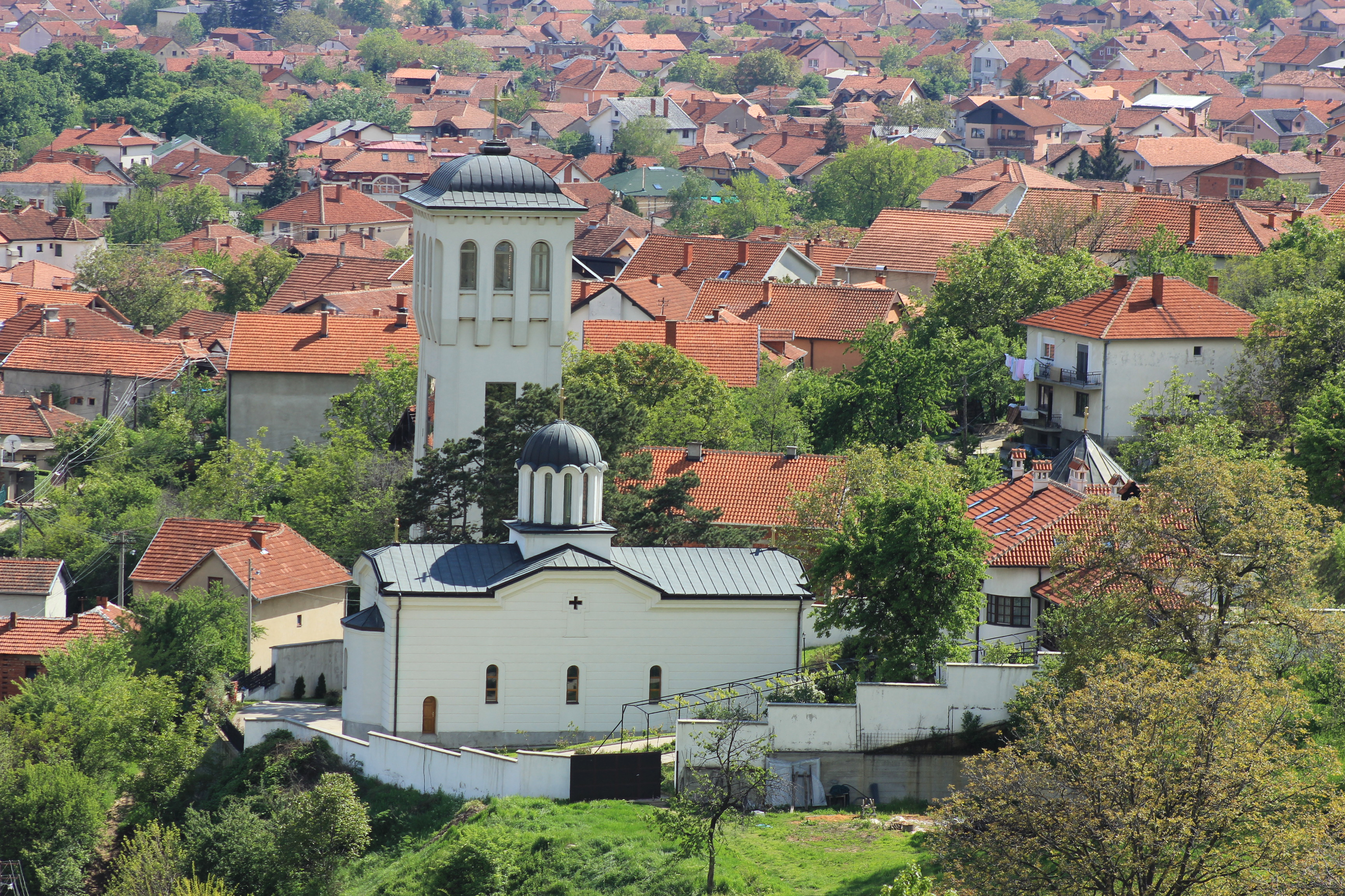 Черква „Св. Никола" в Враня, Сърбия.